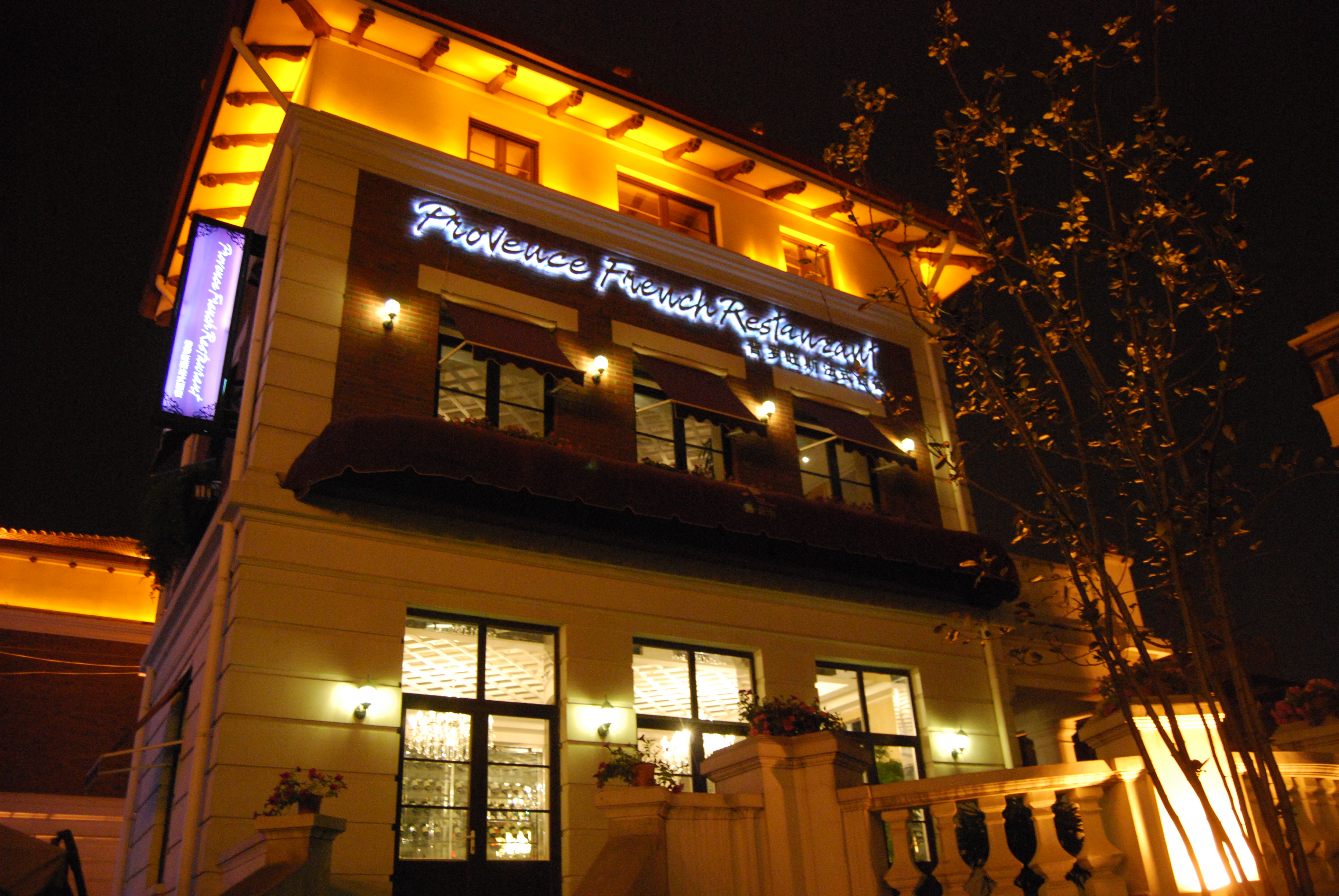 普罗旺斯法式餐厅在天津意式风情区